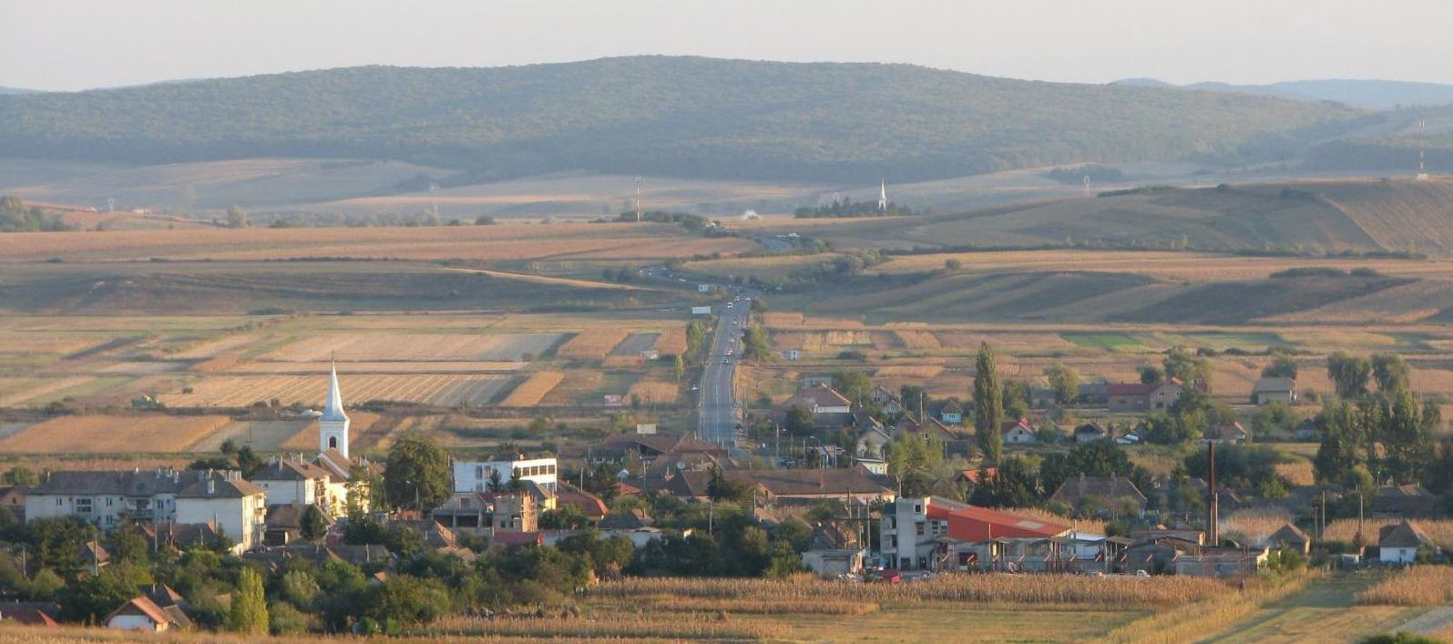 Ákosfalva (Acățari), Románia